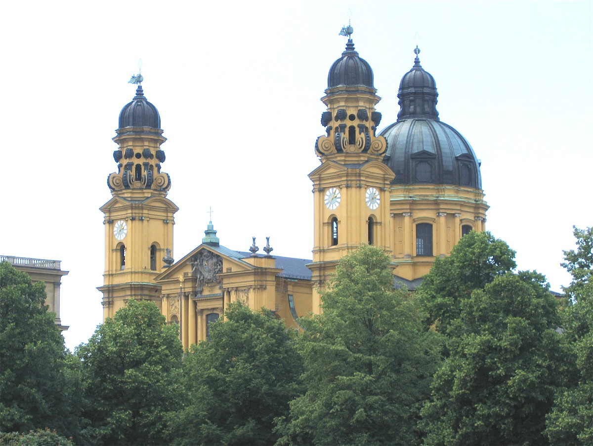 Theatinerkirche in München, vom Hofgarten gesehen